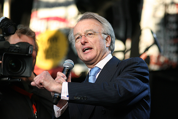 Jozias van Aartsen tijdens KoninginneNach te Den Haag